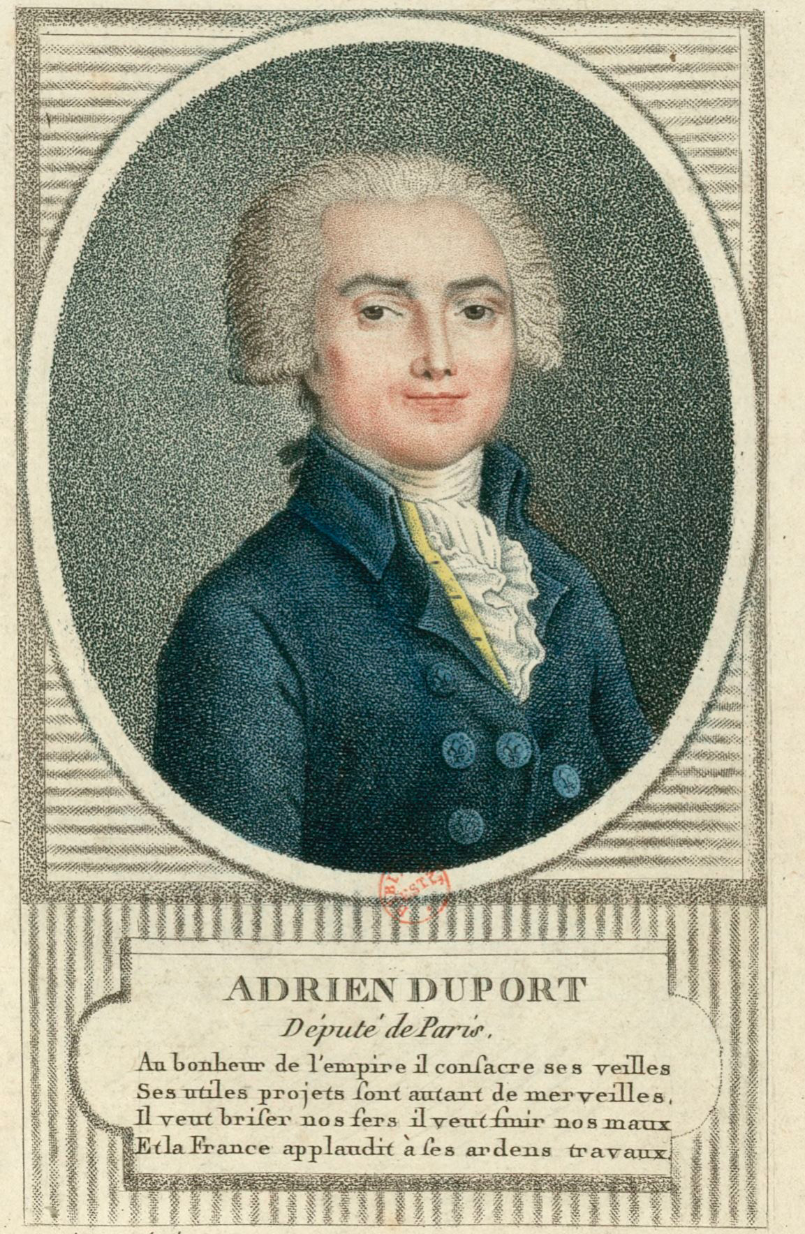 Adrien Duport : député de Paris (estampe, pointillé, eau-forte, roulette).